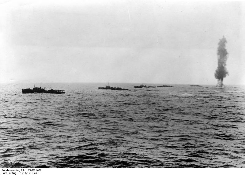 Minensuchflottille, Explodierende Mine Minensuchflottille. Rechts eine im Suchgerät explodierende Mine.